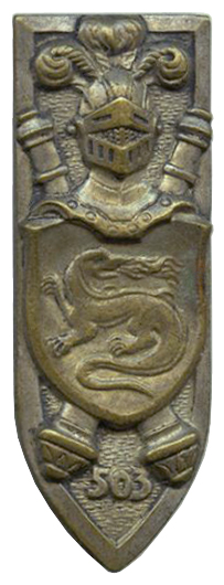 Insigne du 503e régiment de chars de combat Type 2